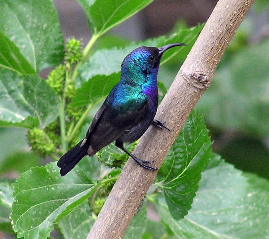 A Nectarinia osea male, taken in Jerusalem, Israel